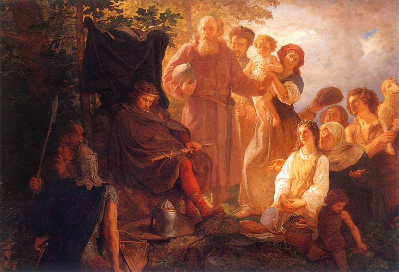 Władysław Łokietek na wygnaniu (en: Wladyslaw the Elbow-high on exile)